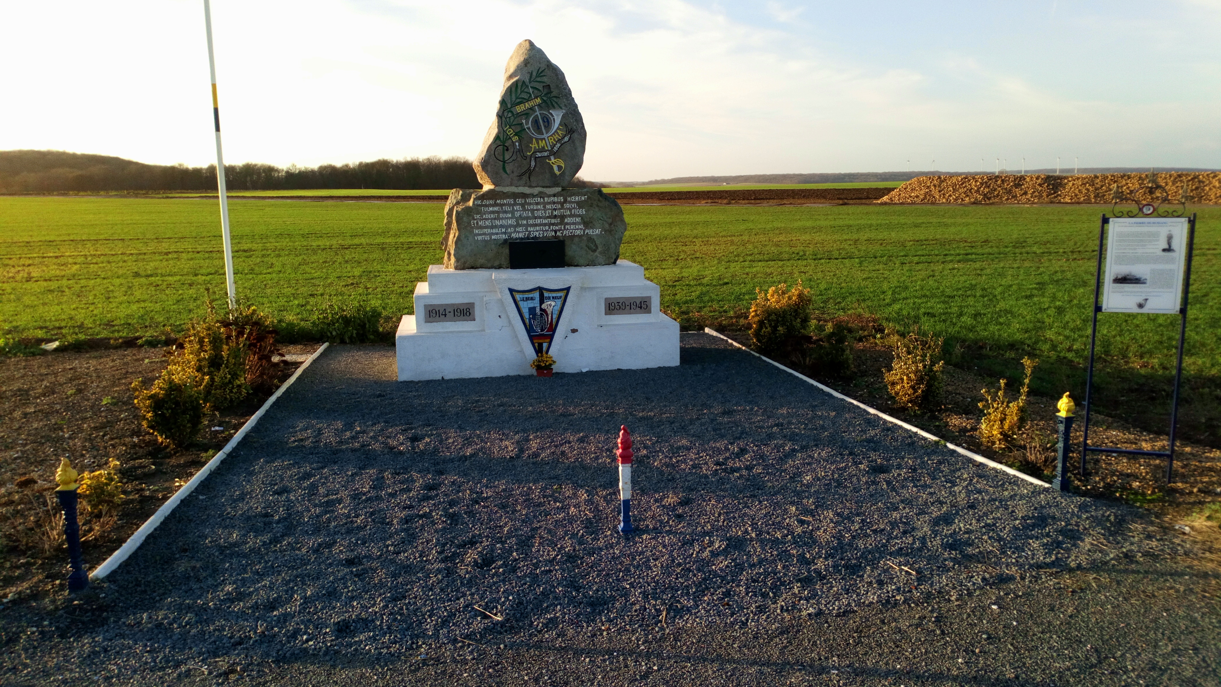 Gratibus, monument au 19e bataillon de chasseurs à pied 9